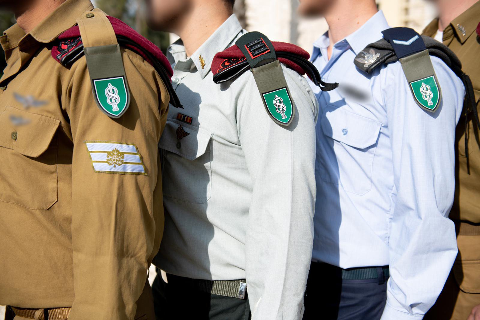 מסדר הקמה ליחידה הרב-ממדית בראשות ראש המטה הכללי, רב-אלוף אביב כוכבי. במסדר נכחו מפקד זרוע היבשה, אלוף יואל סטריק, מפקד חיל האוויר, אלוף עמיקם נורקין, ראש אגף המודיעין, אלוף תמיר הימן, ראש אגף התקשוב, אלוף ליאור כרמלי, מפקד עוצבת "האש", תת-אלוף ירון פינקלמן, מפקד היחידה הרב ממדית, סגן-אלוף ע׳, מפקדי ולוחמי היחידה.